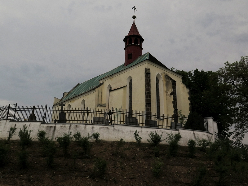 Kostel svatých Filipa a Jakuba, Oldřichov (okres Tábor).